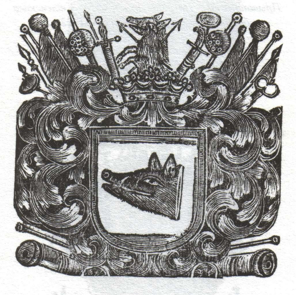 Беларуская (тарашкевіца): Герб «Дзік» Станіслава Эрнэста Дэнгафа (Stanisłaŭ Ernest Denhaf)